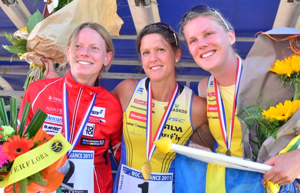 Women Podium Long Distance (J.kocbach)